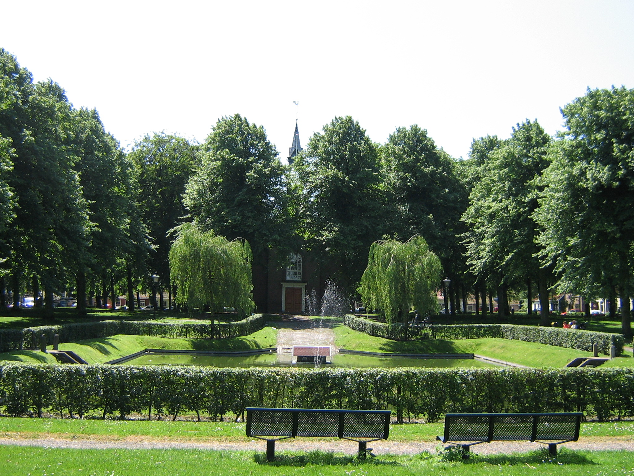 Park op 't durpspleintje van Bossele, zjus voe de kerke. Park op het dorpsplein van Borssele, gemeente Borsele. Het dorpsplein is volgens de gulden snede aangelegd. Park in front of the church on Borssele's central square. The village was planned and the square had been constructed according to the Golden Ratio.